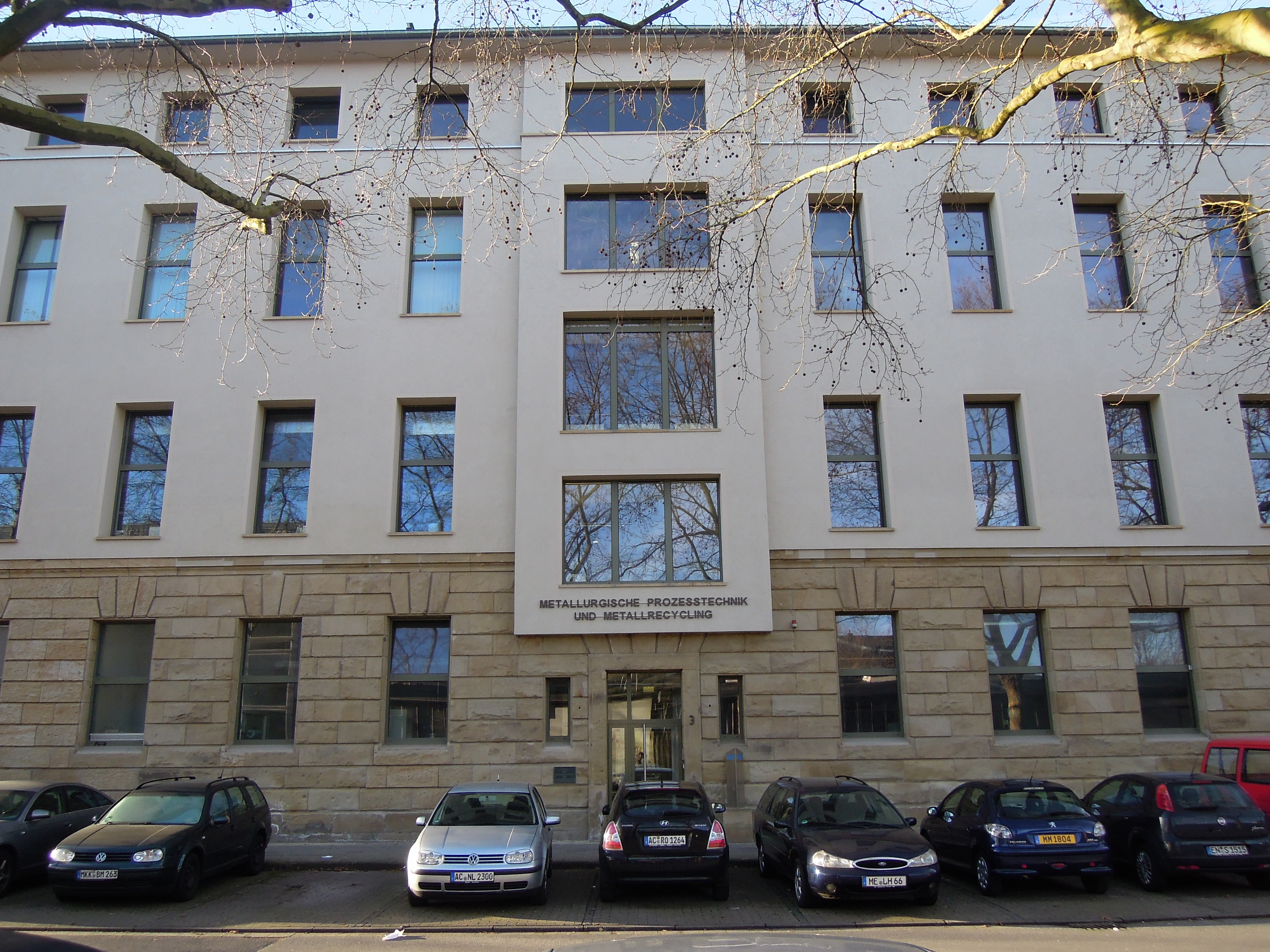 Institutsgebäude an der RWTH Aachen im Frühjahr 2015.